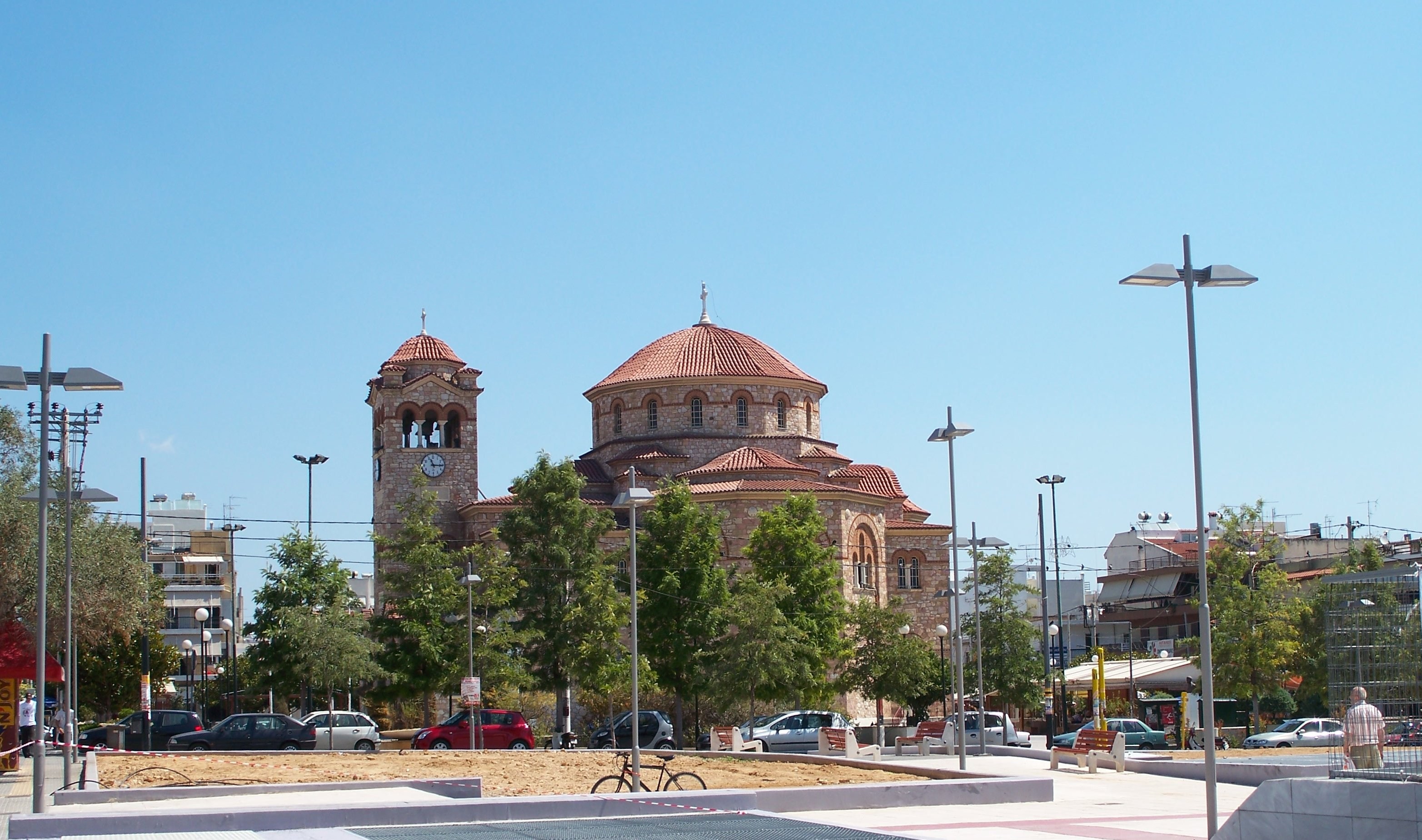 Estavromenou Square, Egaleo, Athens.